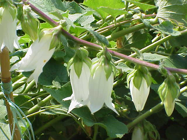 Species: Campanula alliariifolia Family: Campanulaceae Image No. 1